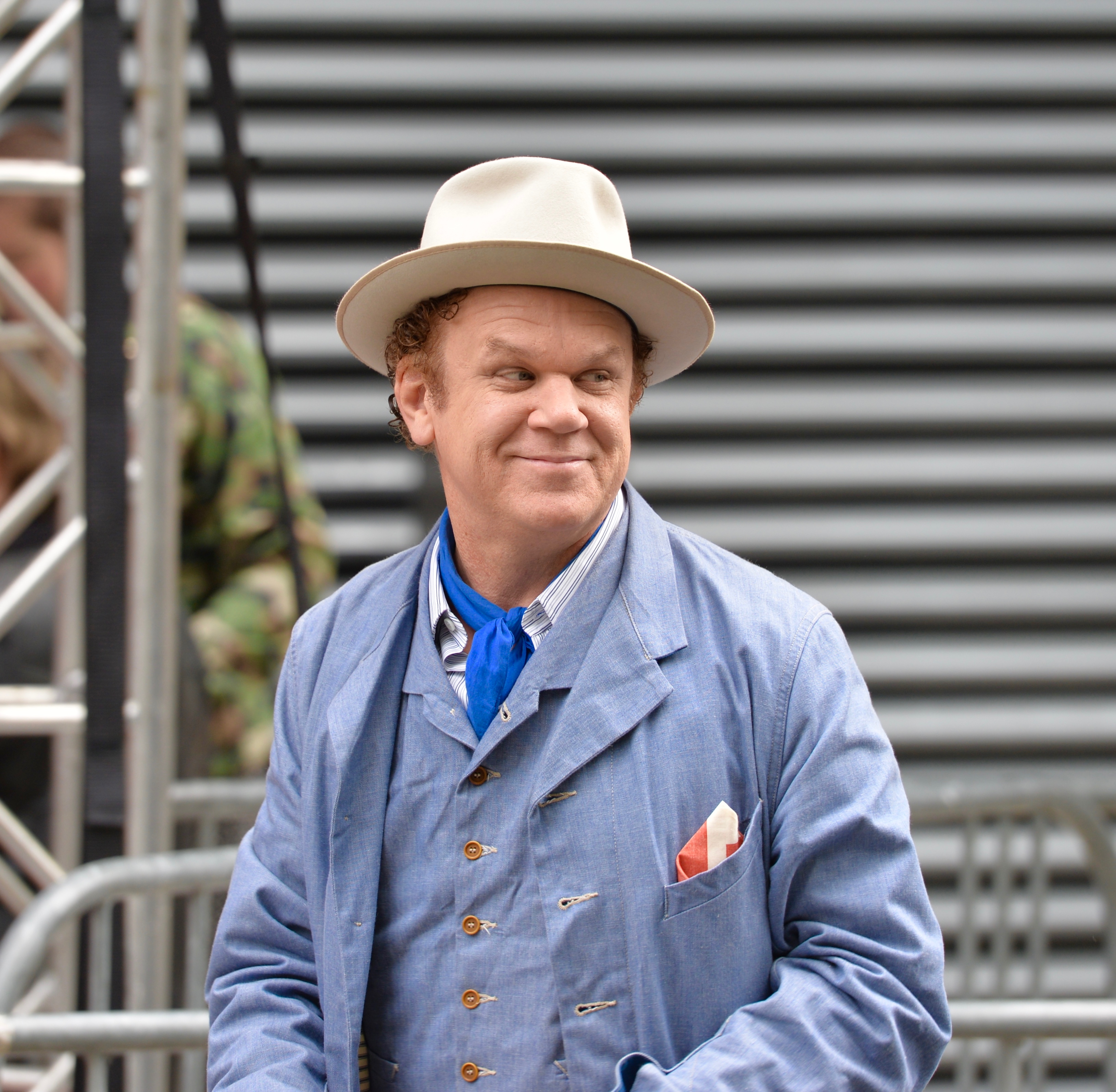 TIFF 2018 - Sister Brothers